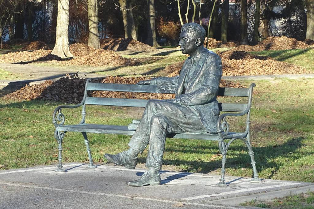 Ławeczka Jerzego Różyckiego w Wyszkowie, fot. Elżbieta Szczuka